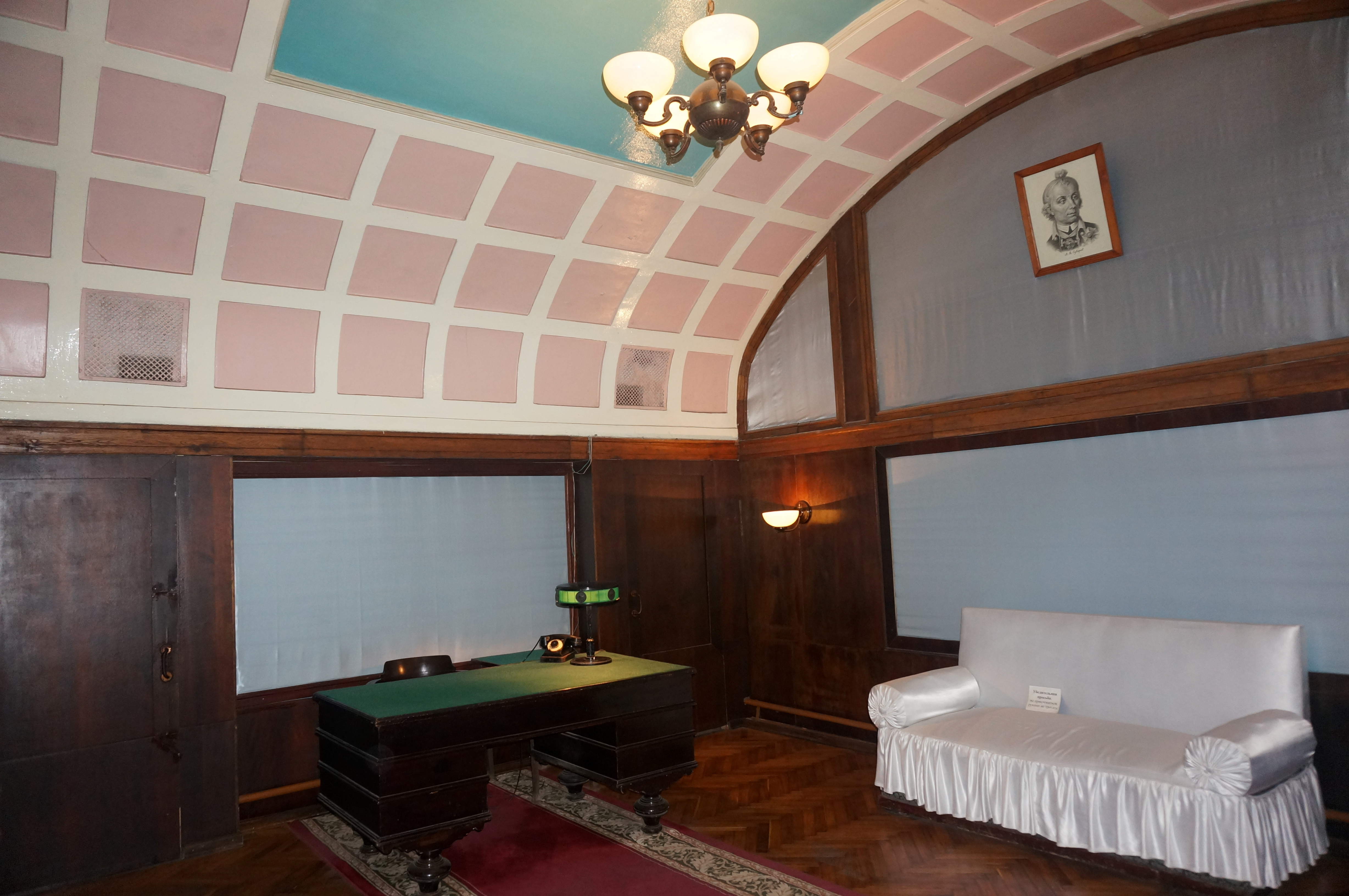 Кабинет Сталина. Бункер Сталина. Самара